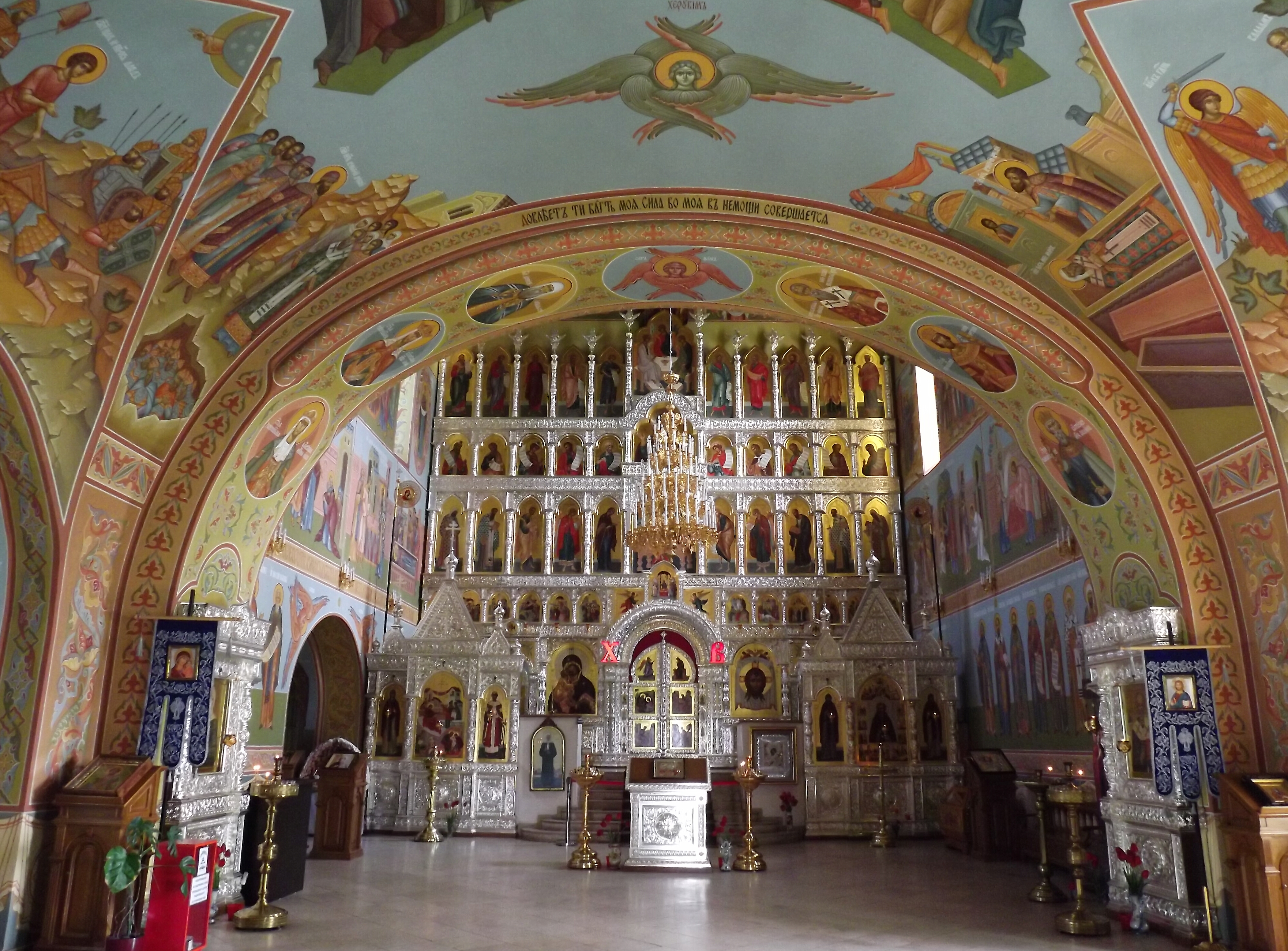 Церковь преподобного Сергия Радонежского: 1.5 км северо-восточнее деревни, урочище Красный Холм, Ивановка, Куркинский район, Тульская область